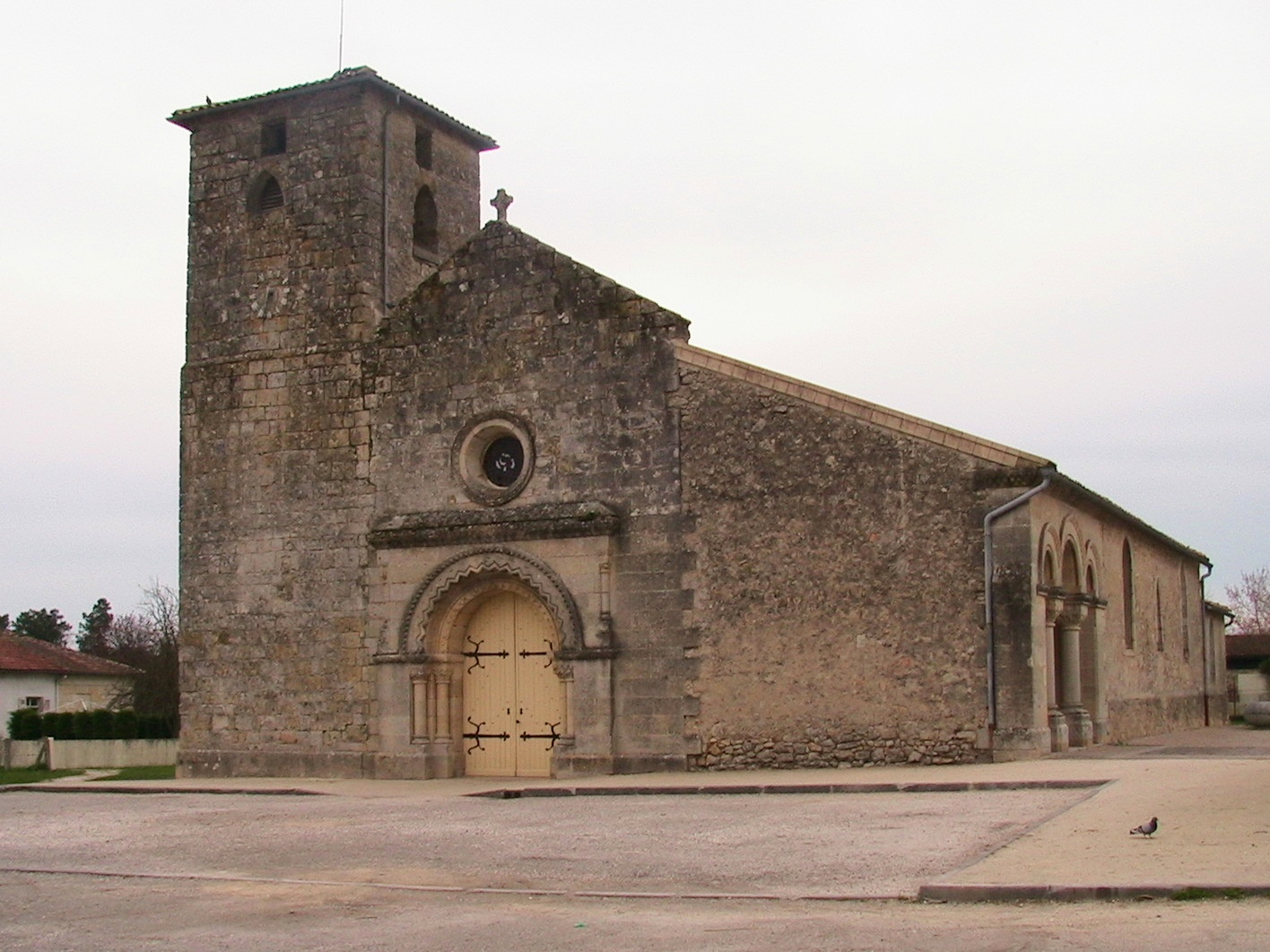 Church of Saint-Aubin-de-Médoc, Gironde (33), France. Photo personnelle prise le 26 Mars 2006.